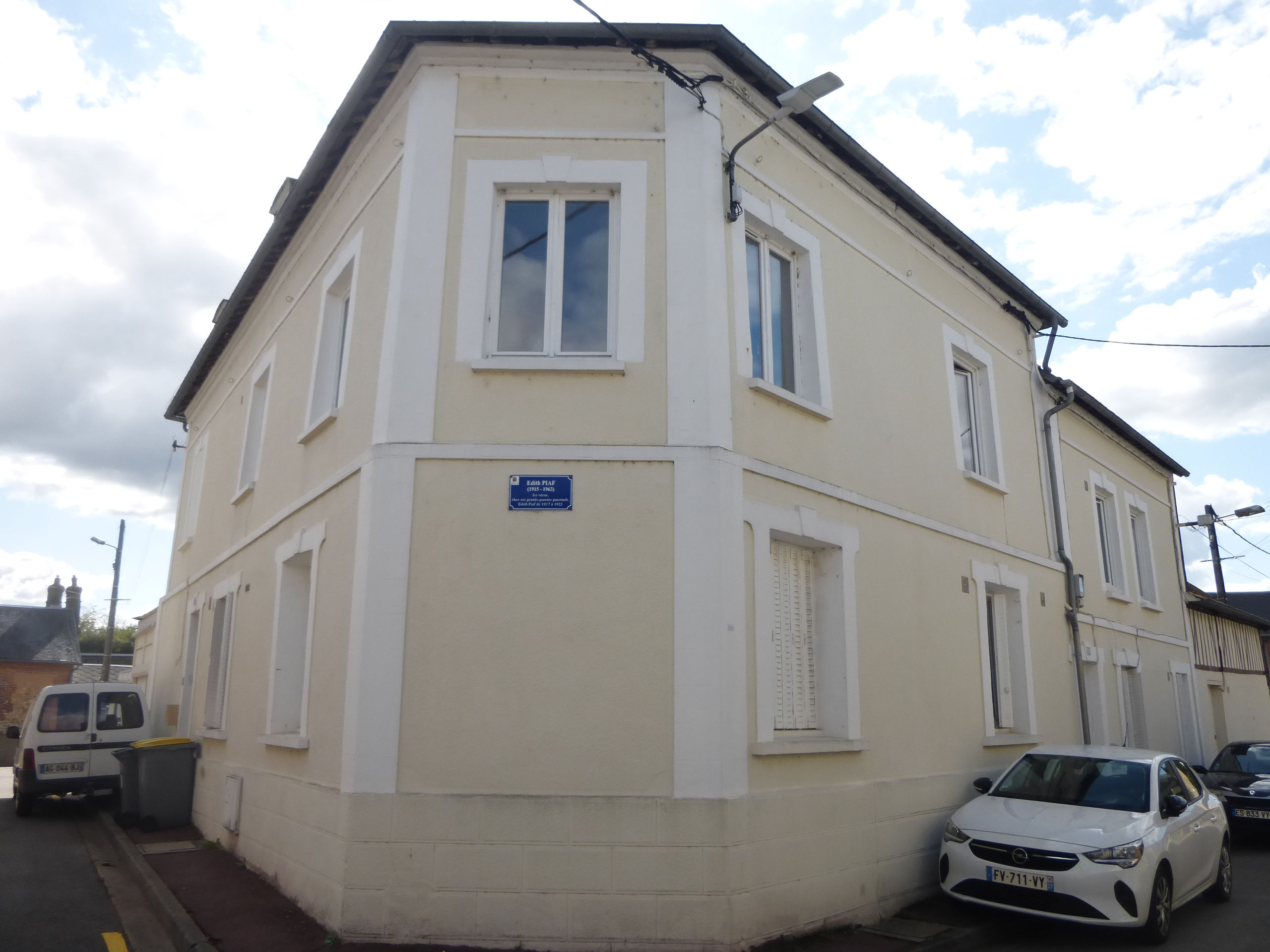 Maison de la grand-mère paternelle d'Edith Piaf, à Bernay (Eure). C'était alors une maison close...